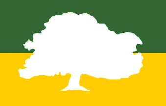 Bandera del municipio Roscio, estado Bolívar, Venezuela